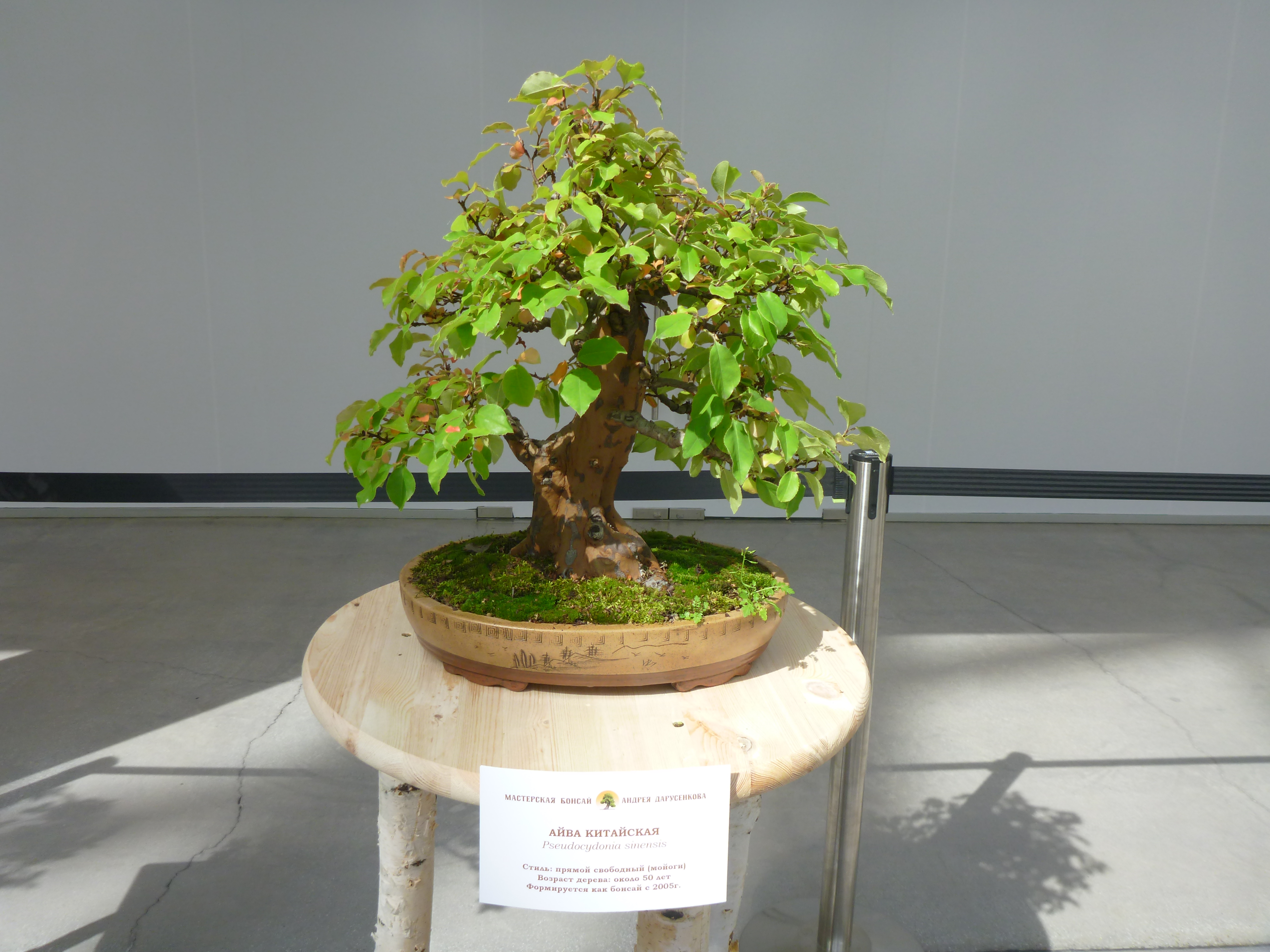 Айва китайская бонсай в Ельцин-центре 2019 год